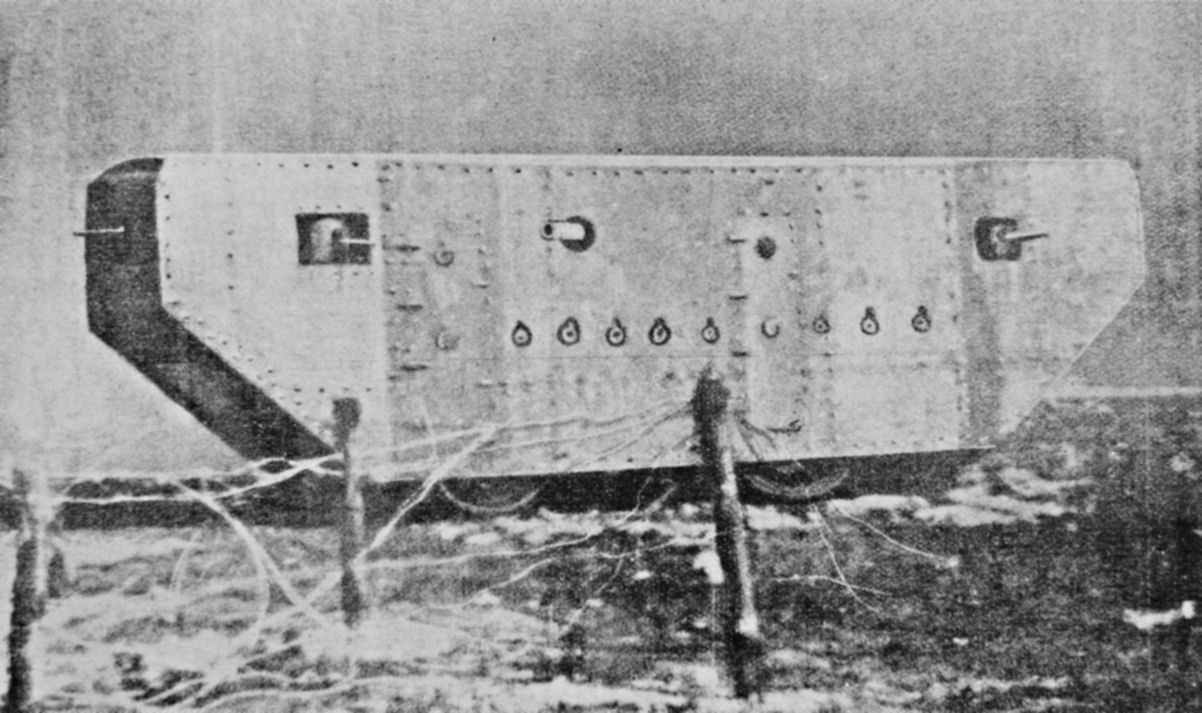 Frot Laffly landship, an early tank.